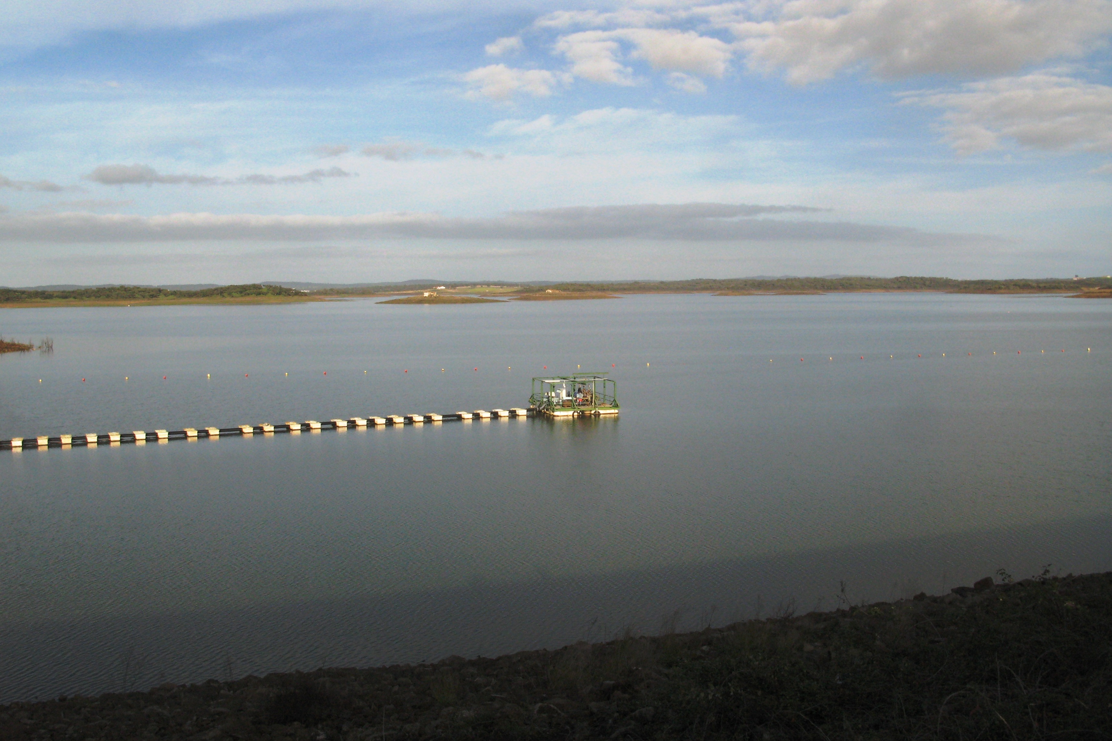 Barrage vun Alvito. Vue op de Séi an d'Waasserpompelen.